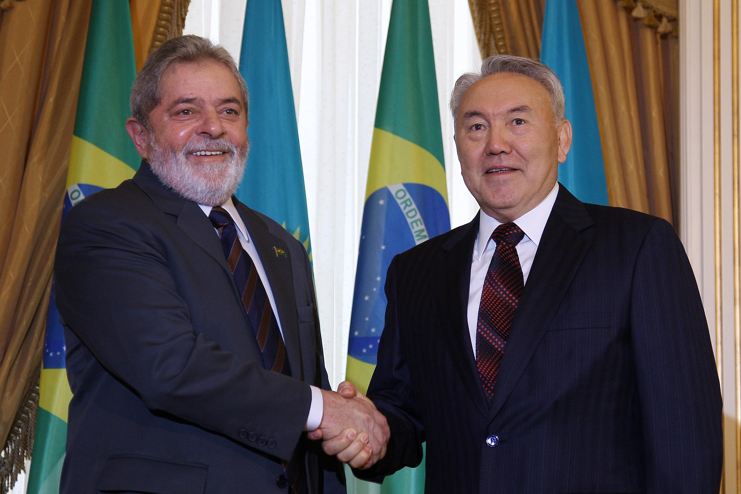 O presidente Luiz Inácio Lula da Silva é recebido pelo presidente do Cazaquistão, Nursultan Nazarbayev